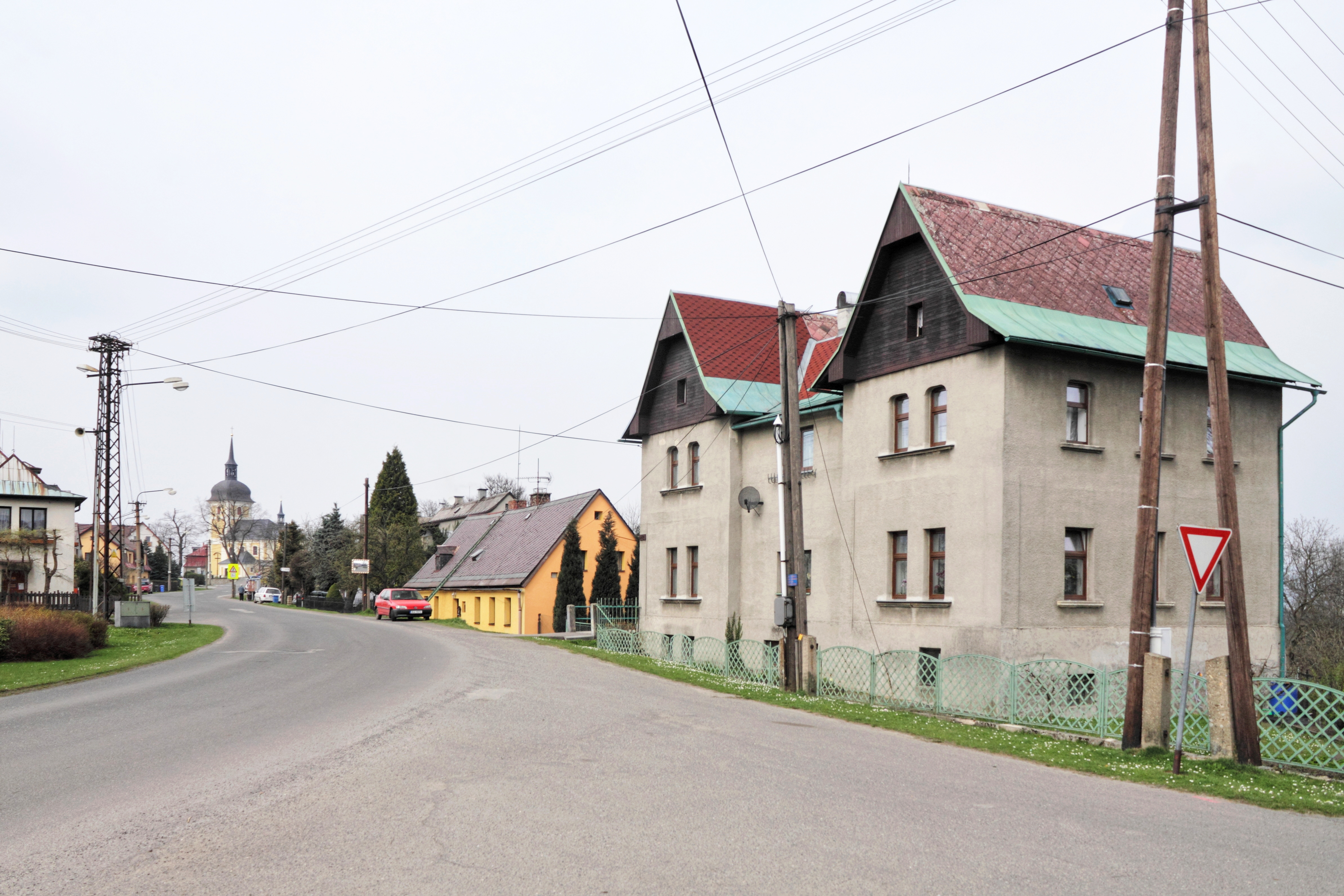 Dlouhý Most